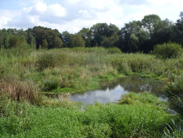 Naturschutzgebiet Ruschdahlmoor, Bremen-Burglesum, Ortsteil Lesum